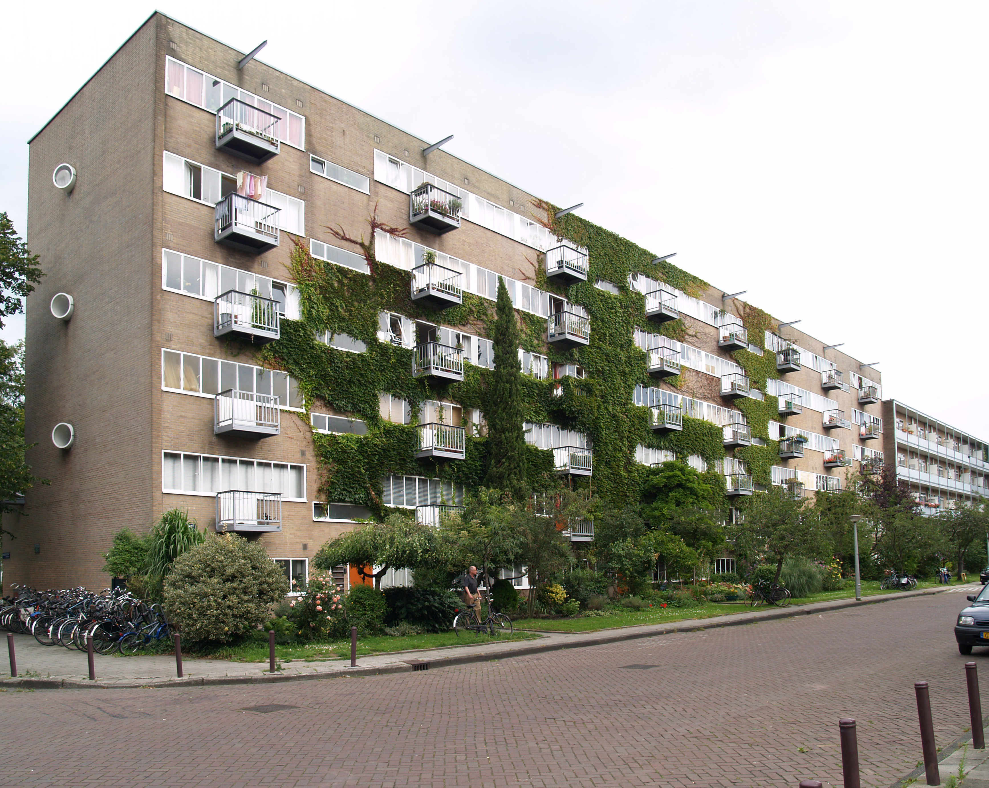 Amsterdam, Zomerdijkstraat (Rivierenbuurt), atelierwoning zuidzijde